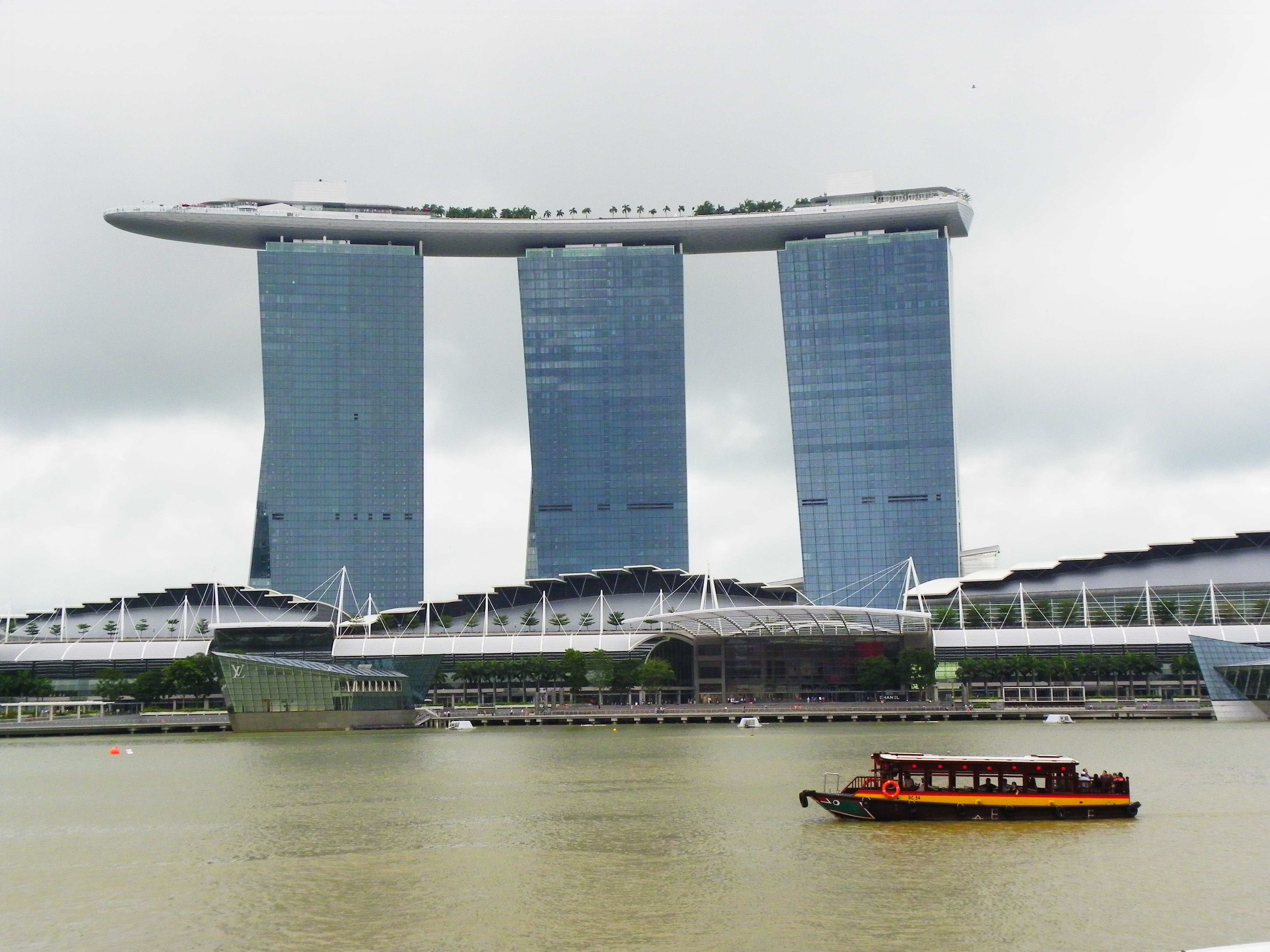 由魚尾獅公園遠望濱海灣與金沙飯店。